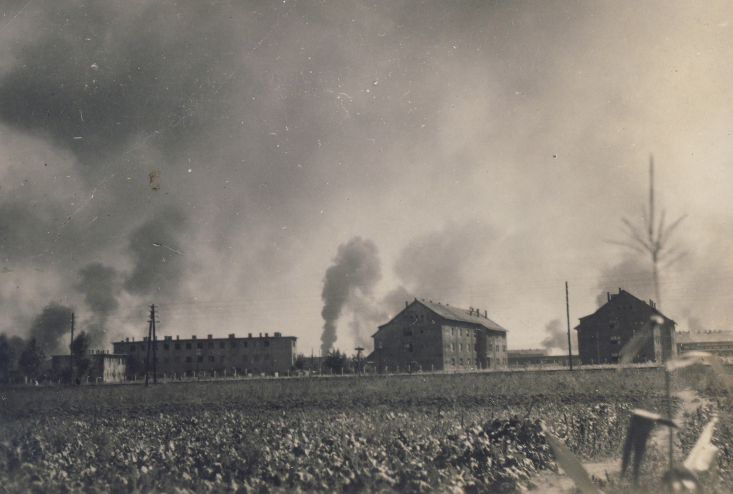 Pápai reptér a második világháború alatt (Csiffáry Jenő János)